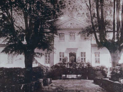 Wiednitz, ehem. Herrenhaus um 1900, abgebrochen